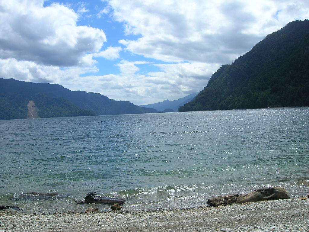 Chapo Lake, Chile